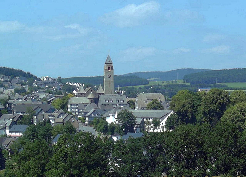 Schmallenberg (Kirche), Germany.